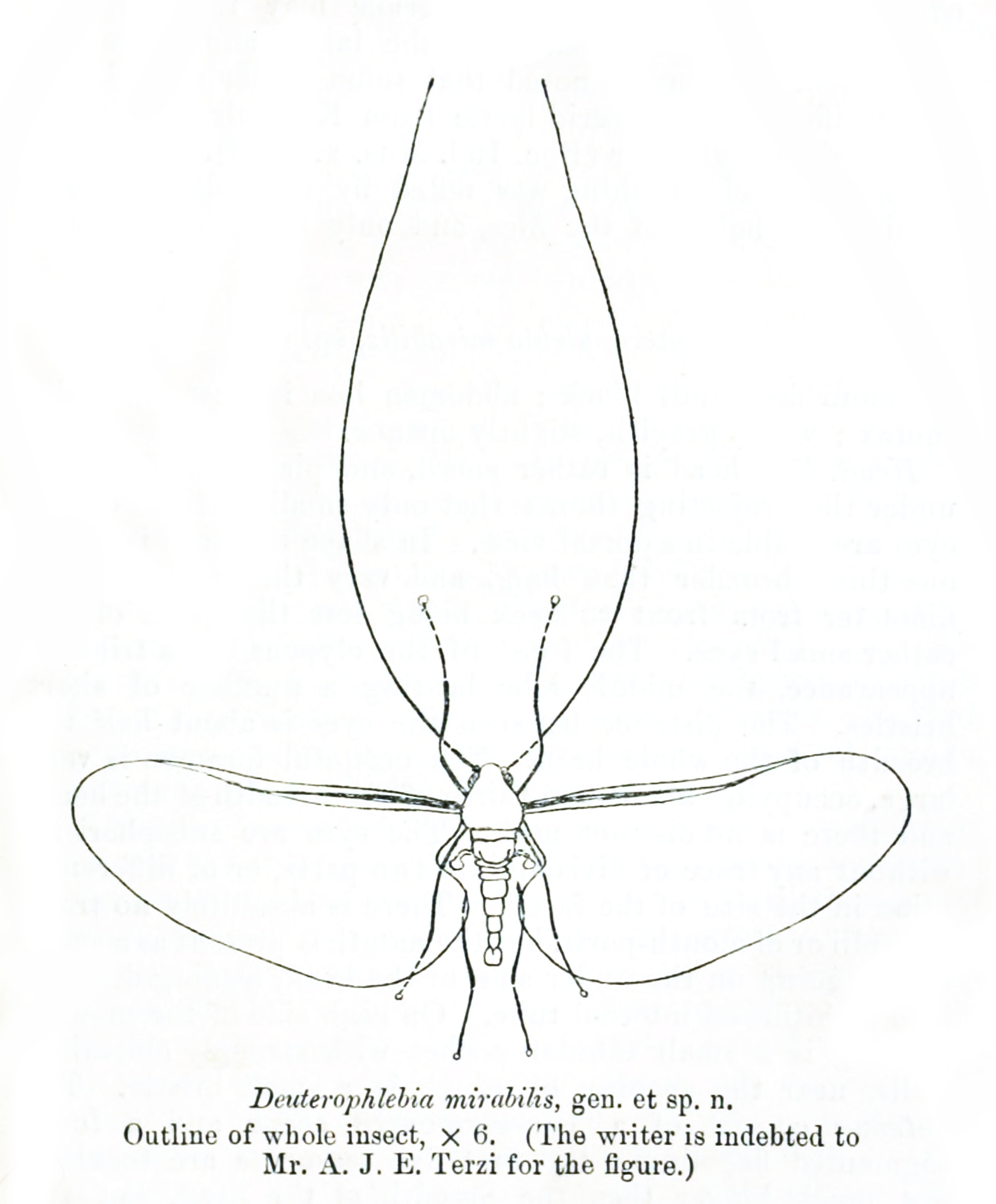 Deuterophlebia mirabilis - legs